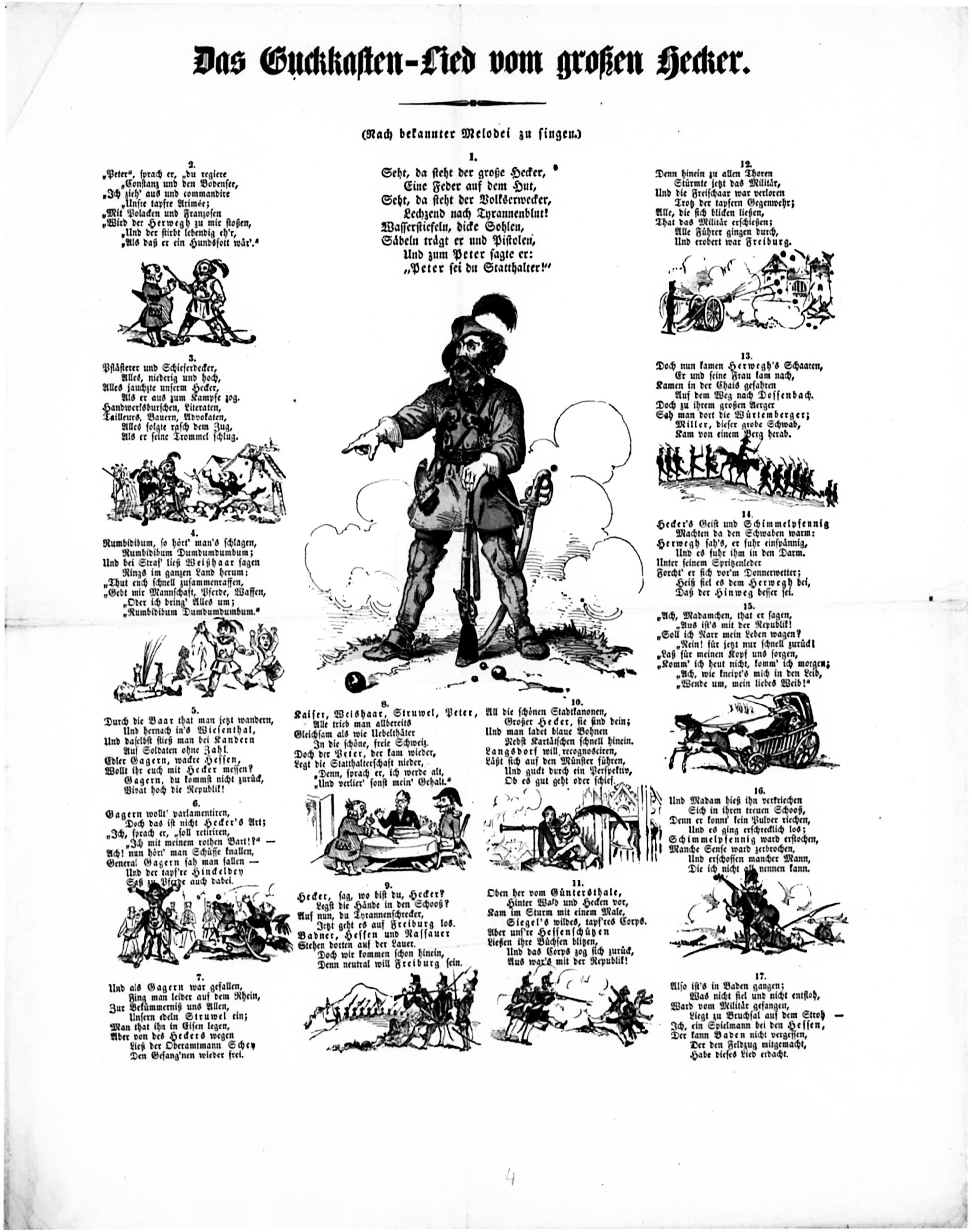 Flugblatt mit einem Spottgedicht auf Hecker und die badische Revolution nach dem gescheiterten Aprilaufstand 1848